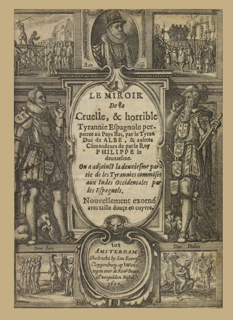 Casas, Bartolomé de las, (1474-1566), Gysius, Johannes, (....-1652), Lons, Dirck Eversen, (ca 1599-....) & Vinckeboons, David, (1576-1629), graveurs.- Le miroir de la cruelle et horrible tyrannie espagnole perpétrée au Pays-Bas par le tyran duc d'Albe et autres commandants du roi Philippe II, Jan Evertszoon Cloppenburch, Amsterdam, 1620